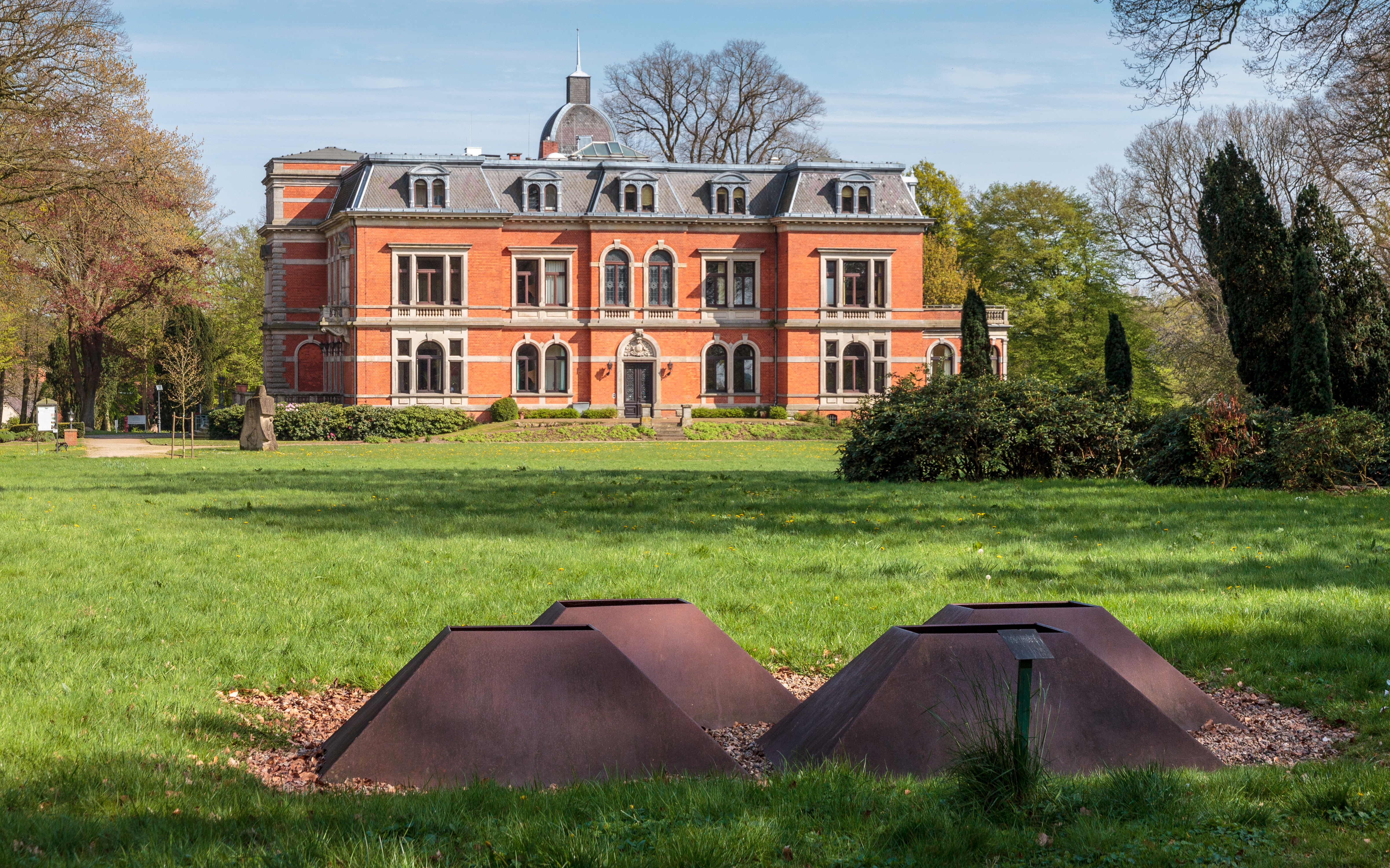 Rück- bzw. Parkseite des Schlosses Etelsen